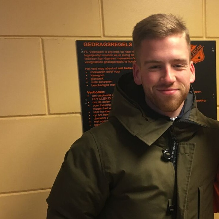 Gijs Smal in februari 2018.